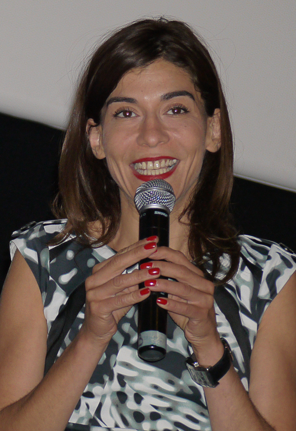 Lubna Azabal, Festival Paris Cinéma 2011.